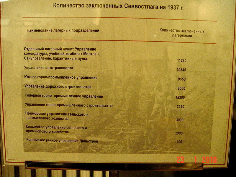 Таблица количества заключённых Севвостлага в 1937 году. Из экспозиции Магаданского областного краеведческого музея.